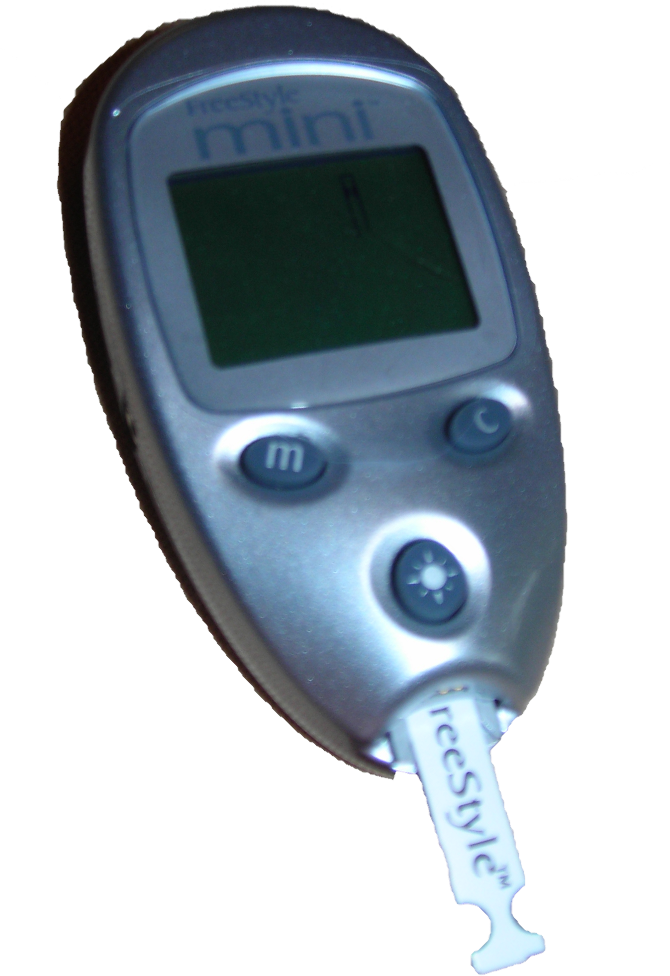 Glucomètre freestyle détouré